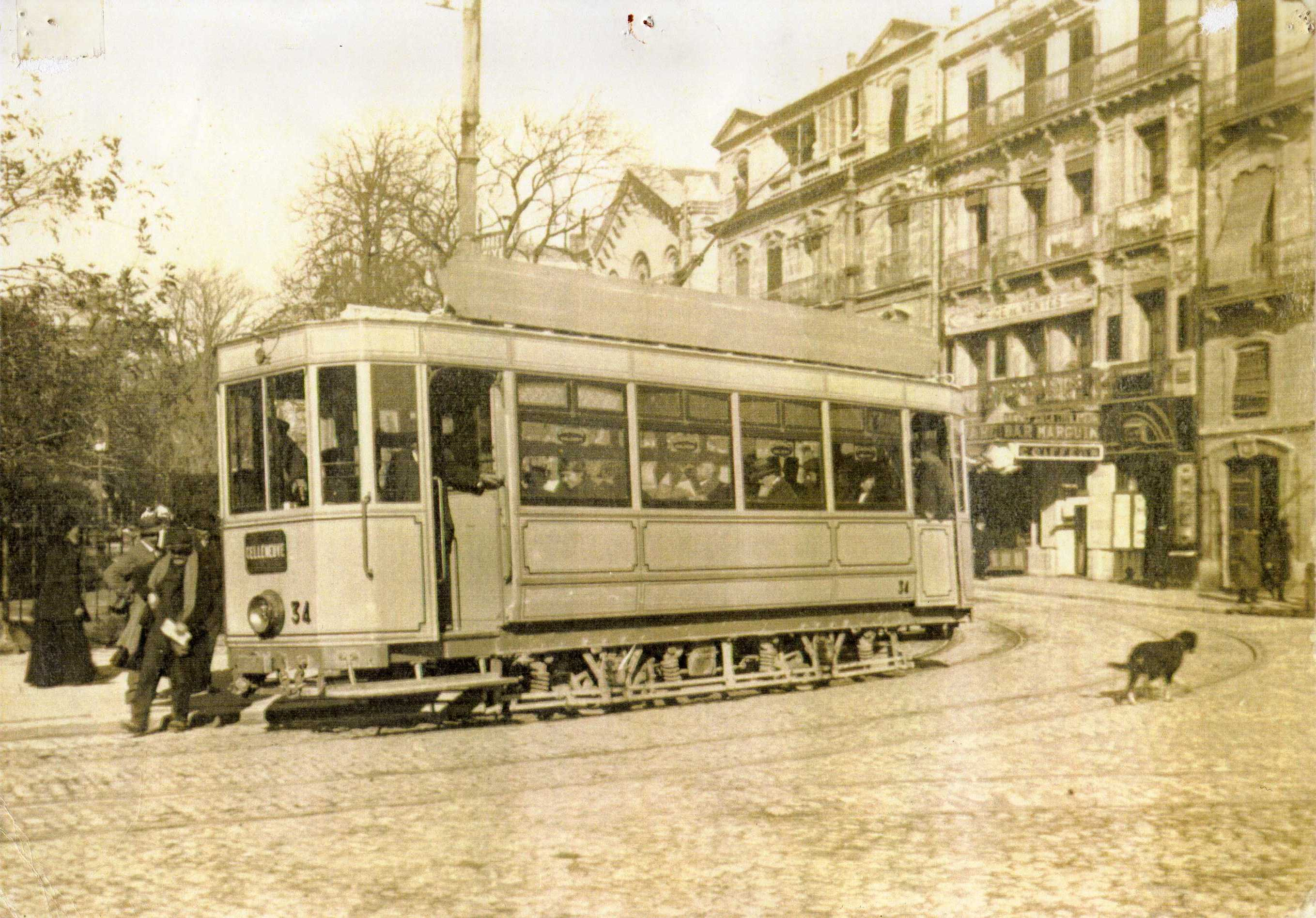 Transports en commun de Montpellier - Station gare PLM (future gare Montpellier Saint-Roch) - Motrice Ragheno vue dans les années 1930.